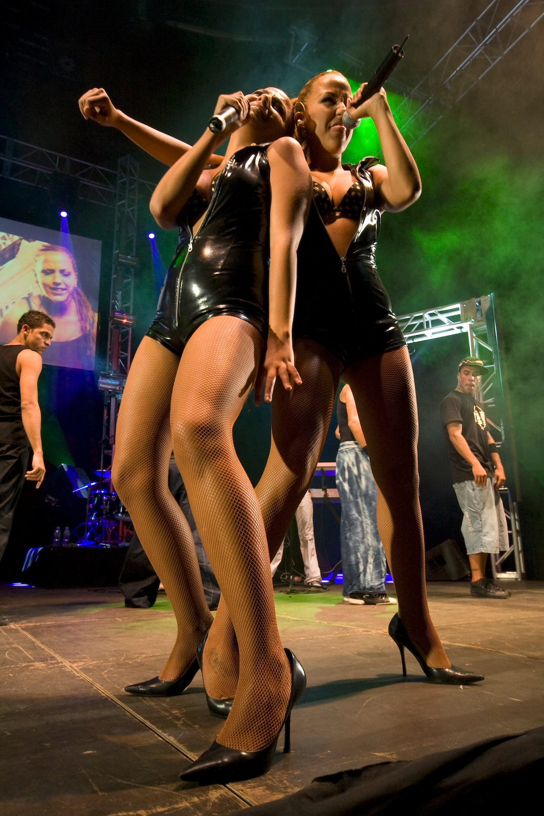 K-Narias